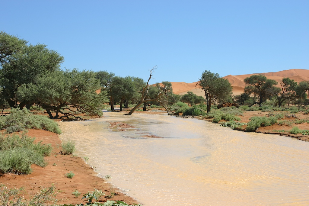 Tsauchab, near Sossusvlei